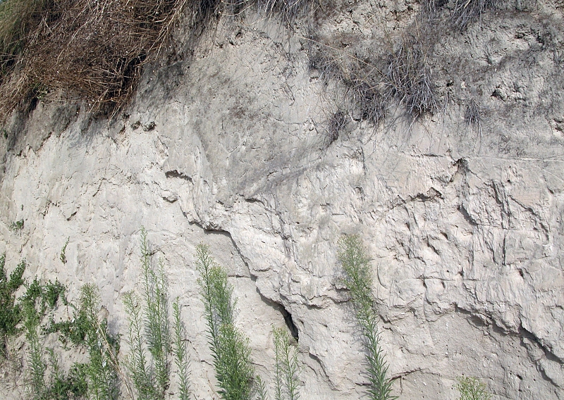 Löß, Kaiserstuhl, Weinberg, Deutschland, Germany